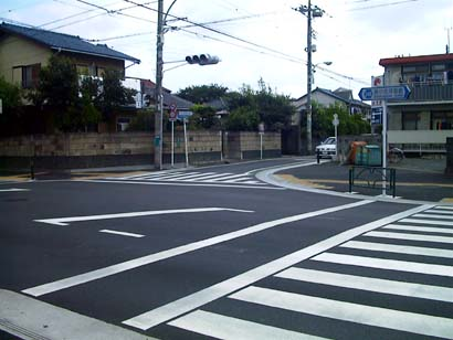 東京都府中市の若松町4丁目交差点。人見街道の起点。